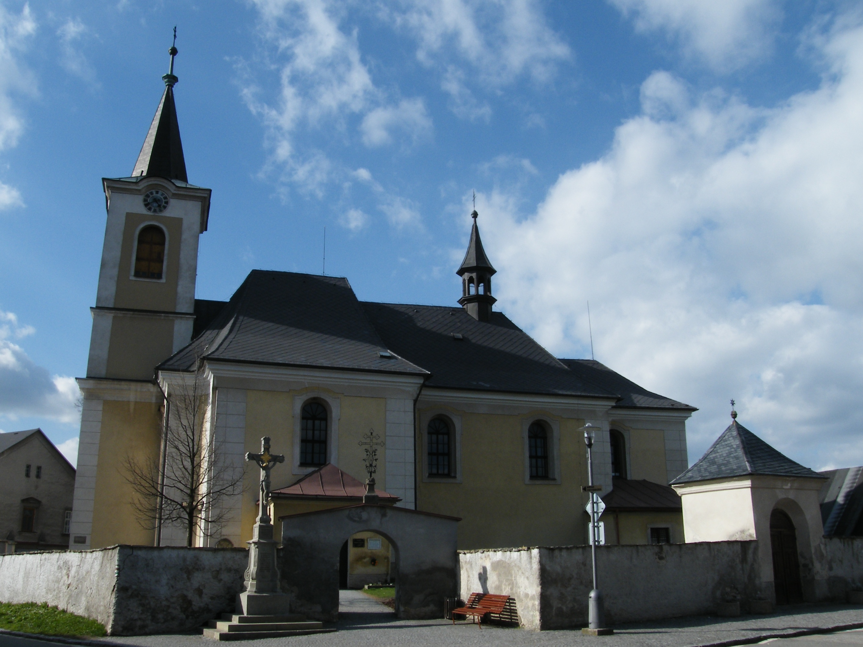 Kostel sv. Petra a Pavla (Nový Hrádek)